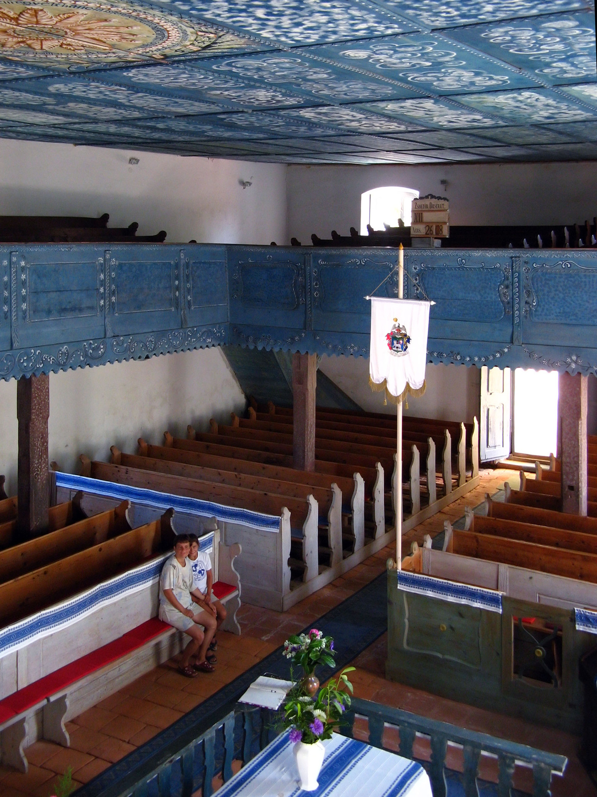 Ref. templom (Szentgyörgyvölgy, Petőfi Sándor u.) This is a photo of a monument in Hungary. Identifier: 11009